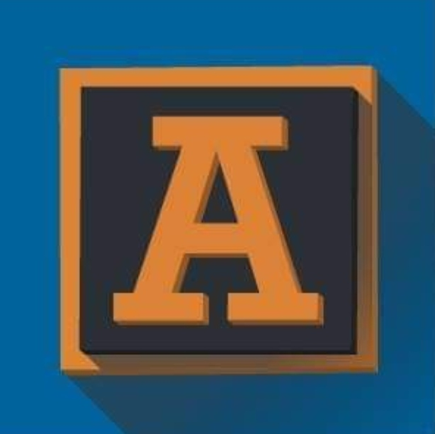 Logo del programa de CMT, Ancha es Castilla-la Mancha.